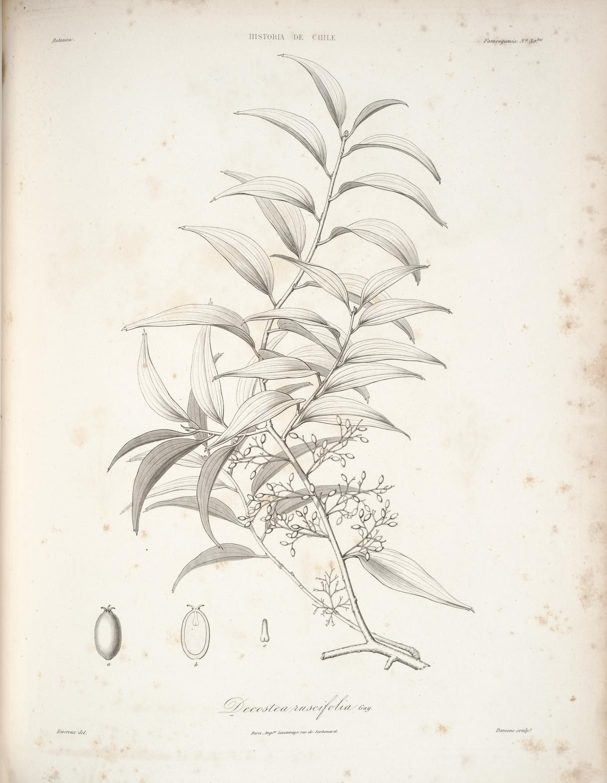 Decostea ruscifolia Clos = Griselinia ruscifolia (Clos) Taub.